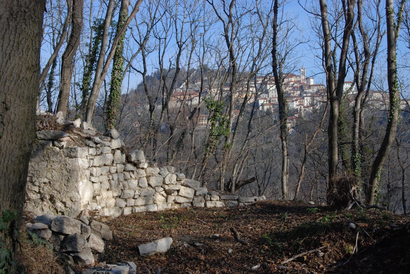 Monte San Francesco sopra Velate